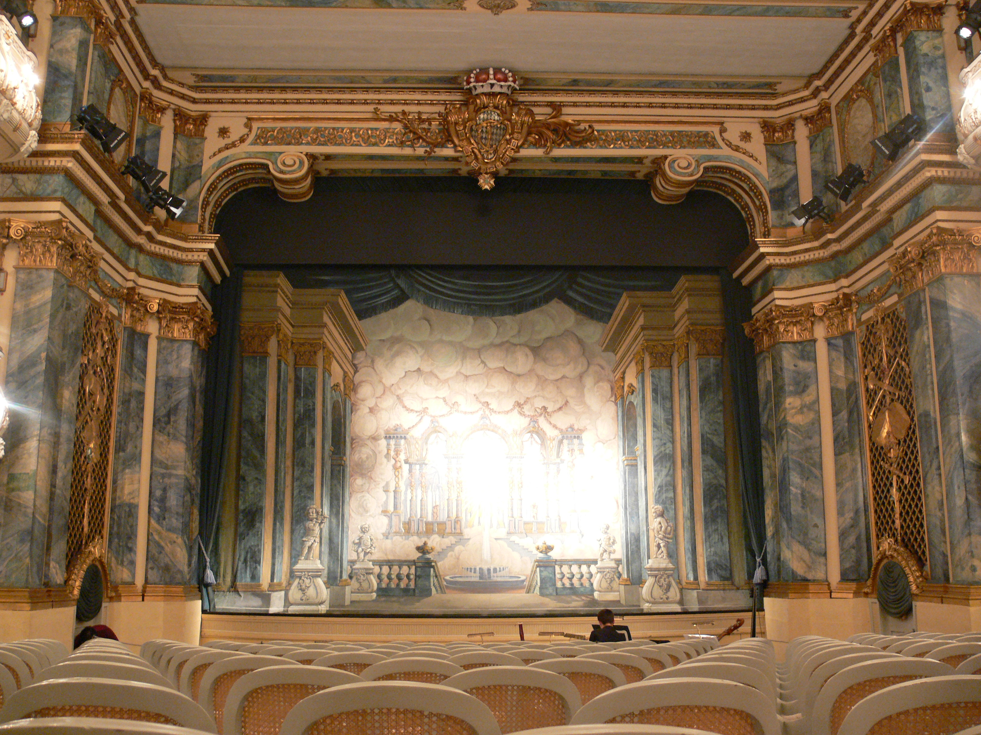 Schlosstheater Schwetzingen (so genanntes „Rokokotheater“) Blick zur Bühne